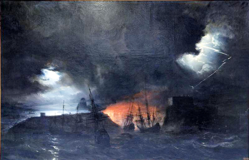 Prise de Rio de Janeiro par l'escadre de René Duguay-Trouin en 1711. Huile sur toile de Théodore Gudin (1841)